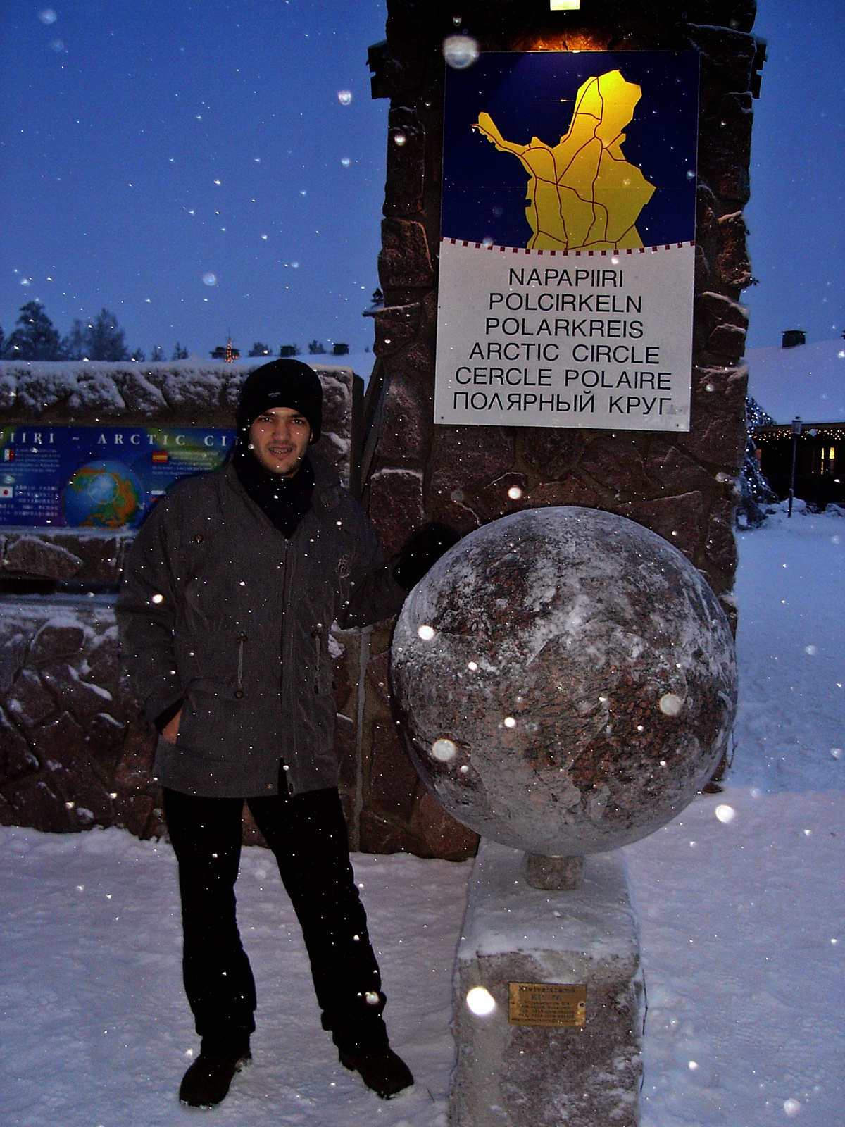 Foto do marco de passagem do Circulo Polar Artico na Lapônia